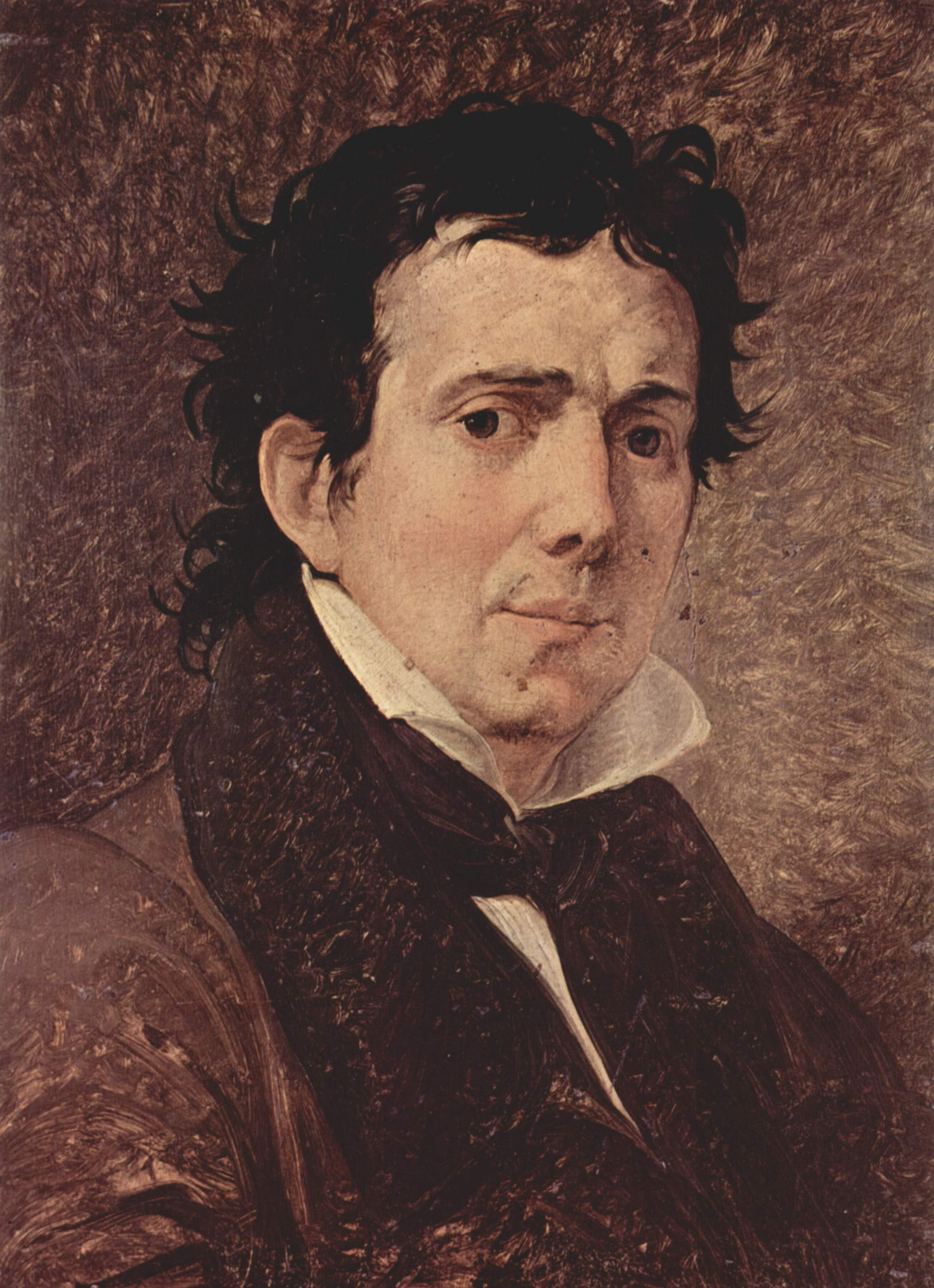 sculptor